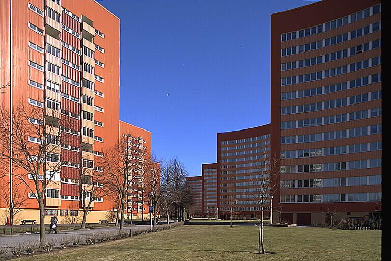 Frölunda. Motiv: Göteborgs Kategori: Bostadsområde Frölunda. Göteborgs.